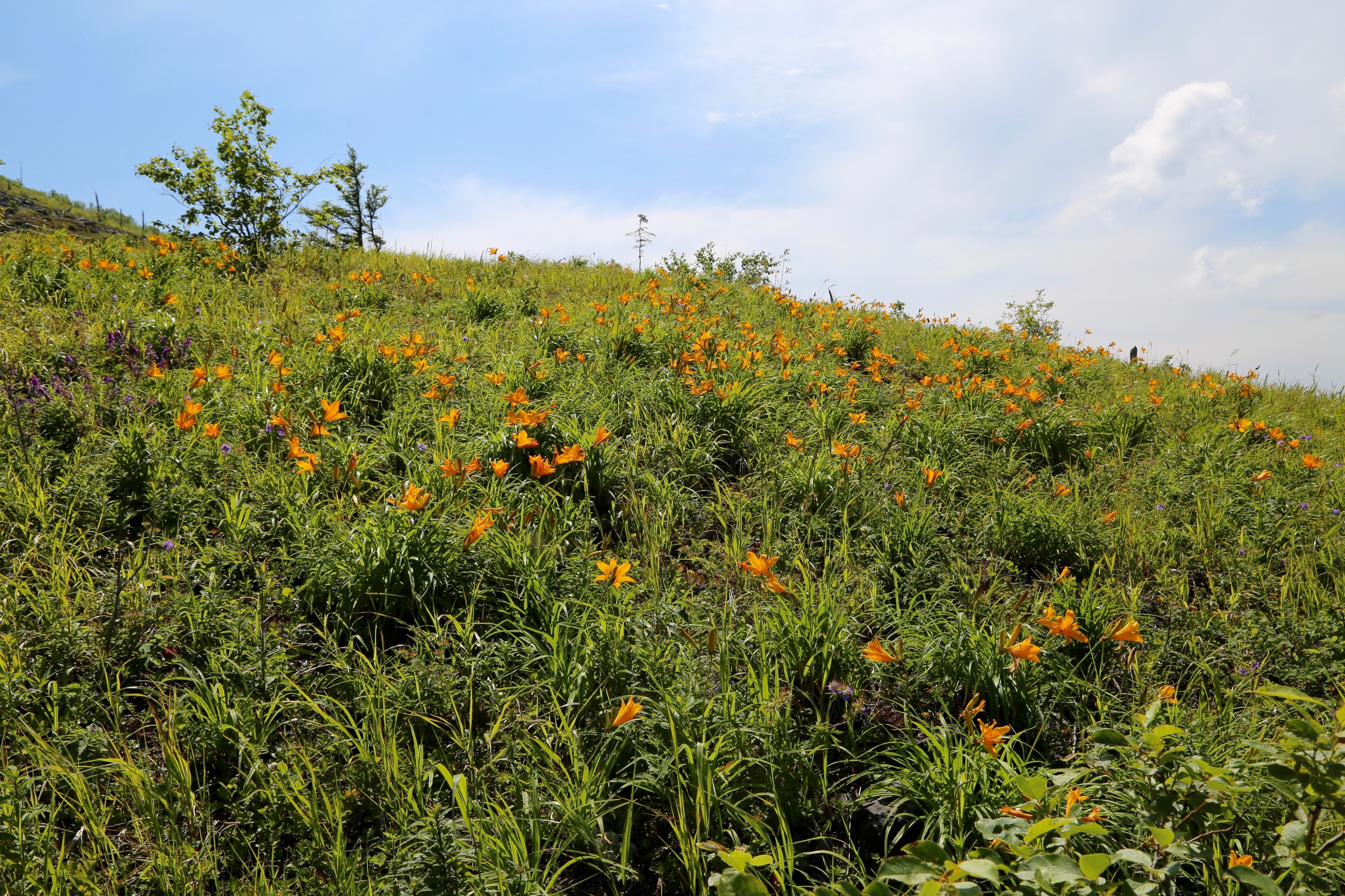 Komsomolsk Nature Reserve (Khabarovsk Krai, Russian Far East), 600 m.